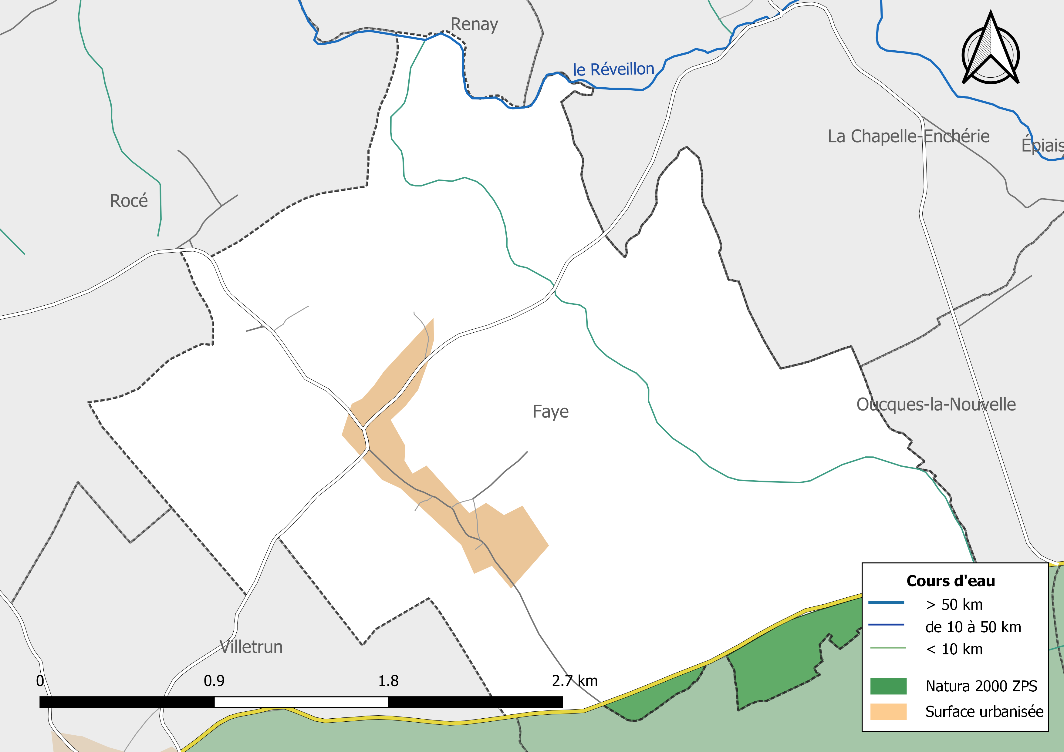 Carte des zones Natura 2000 de type ZPS de la commune de Fay (Loir-et-Cher) (France).